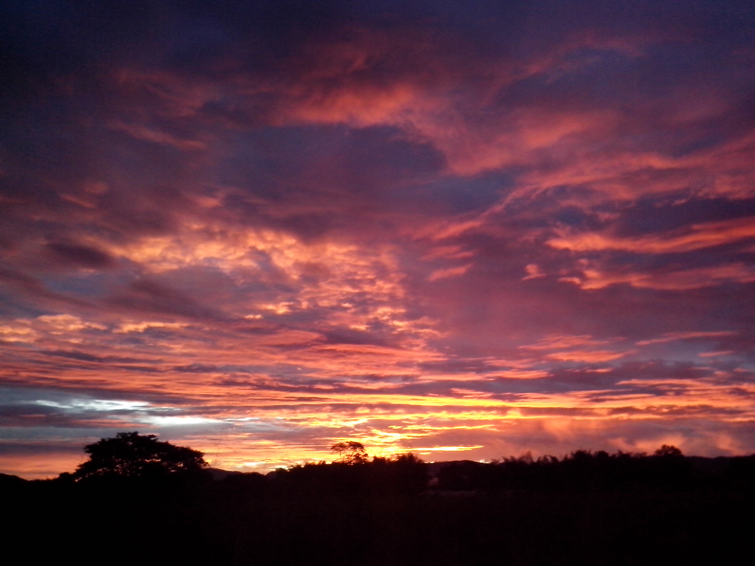 Esta fotografía fue tomada en el municipio colombiano con código 41551.